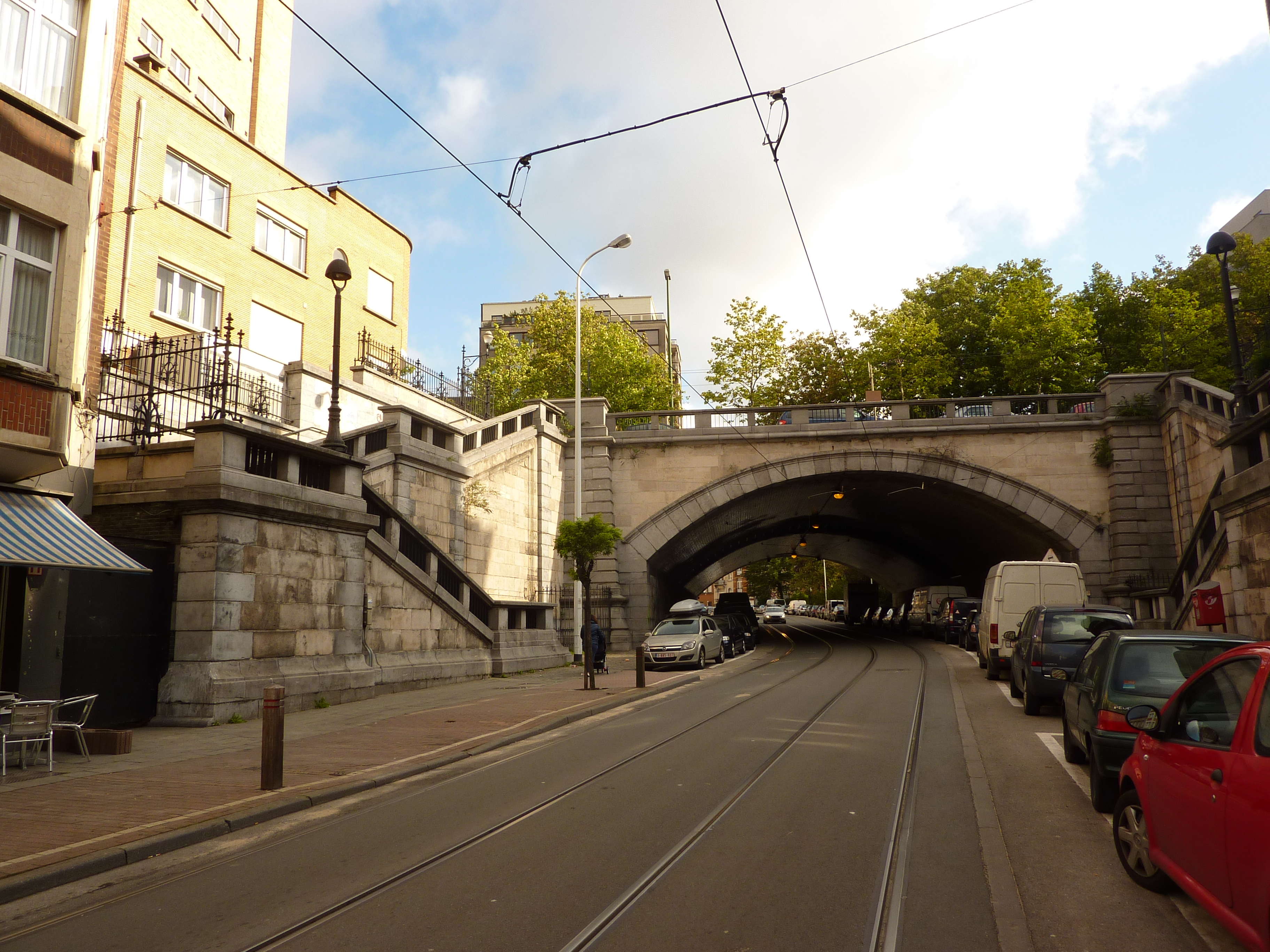 Pont de la chaussée d'Helmet